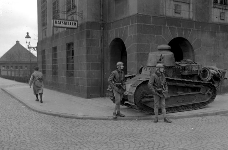 Zu den Ereignissen in Buer (Ruhrgebiet.) Französischer Tank vor dem Rathaus in Buer.